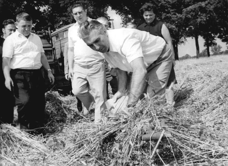 LPG Löwenberg, Besuch durch Georg Ewald ADN-ZB Link hä.-13.8.72 Bez.Potsdam: Minister Ewald bei Genossenschaftsbauern- Mit Genossenschaftsbauern der Kooperation Löwenberg im Bezirk Potsdam beriet am 13.8.72 Georg Ewald, Kandidat des Politbüros des ZK der SED und Minister für Land-, Forst- und Nahrungsgüterwirtschaft, die besten Methoden zur Bergung des Lagergetreides unter geringsten Verlusten. Bei kleinen Lagerstellen kamen die Kombines nur schwer vorwärts. Nach einer kurzen Beratung kamen die Anwesenden zu der Auffassung, das Getreide mit herkömmlichen Arbeitsgeräten hochzuheben. Minister Ewald demonstriert hier das Hochheben des Getreides.(Beachten Sie auch das Foto Nr. L 0813-16N)